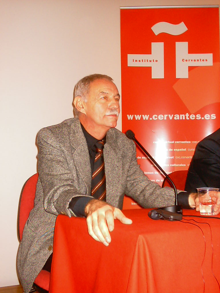 Эдуардо мендоса читает лекцию в московском Институте Сервантеса